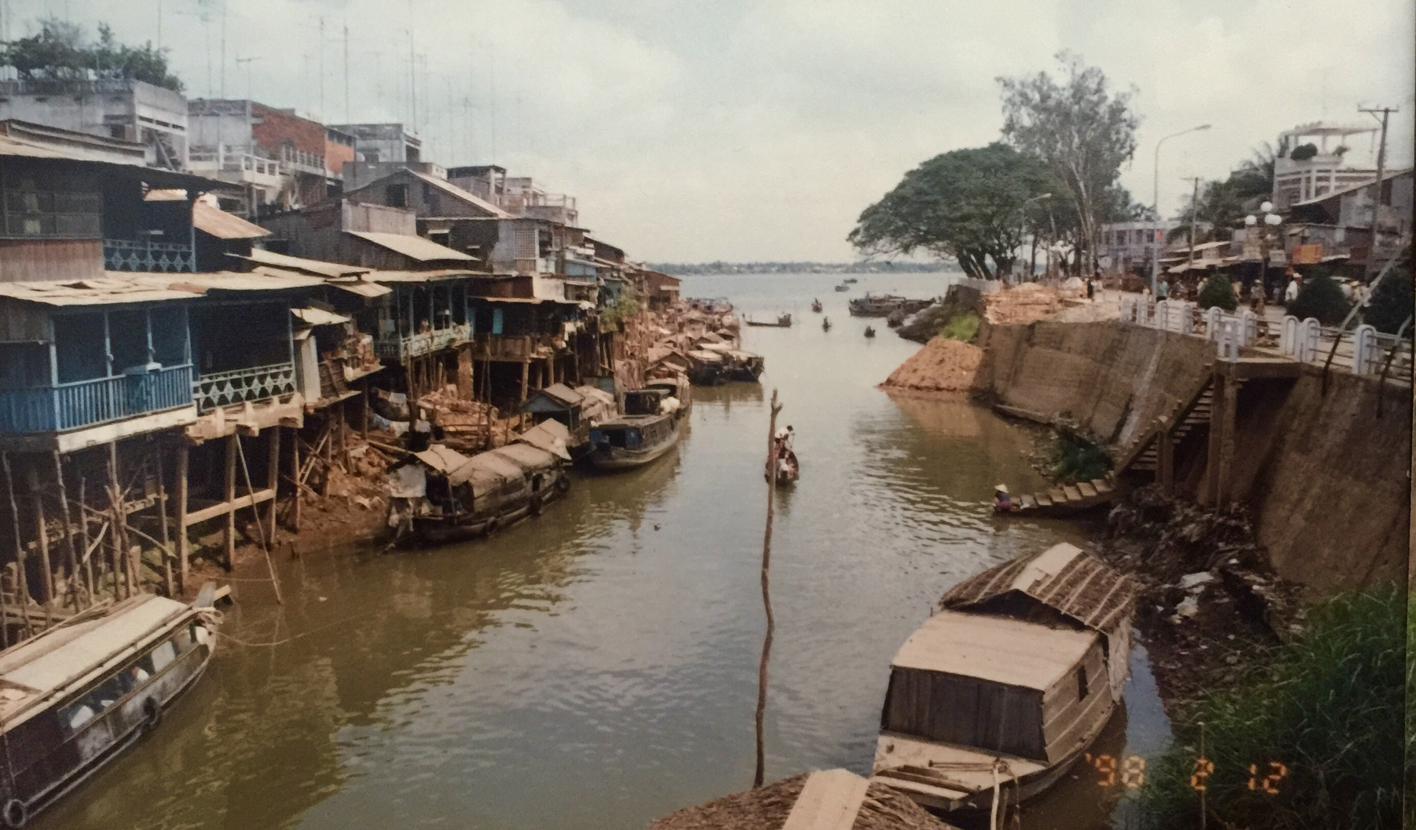 Kenh Vinh An(hinh Xua),Long Chau-Tan chau, Tx Tanchau- Angiang xua